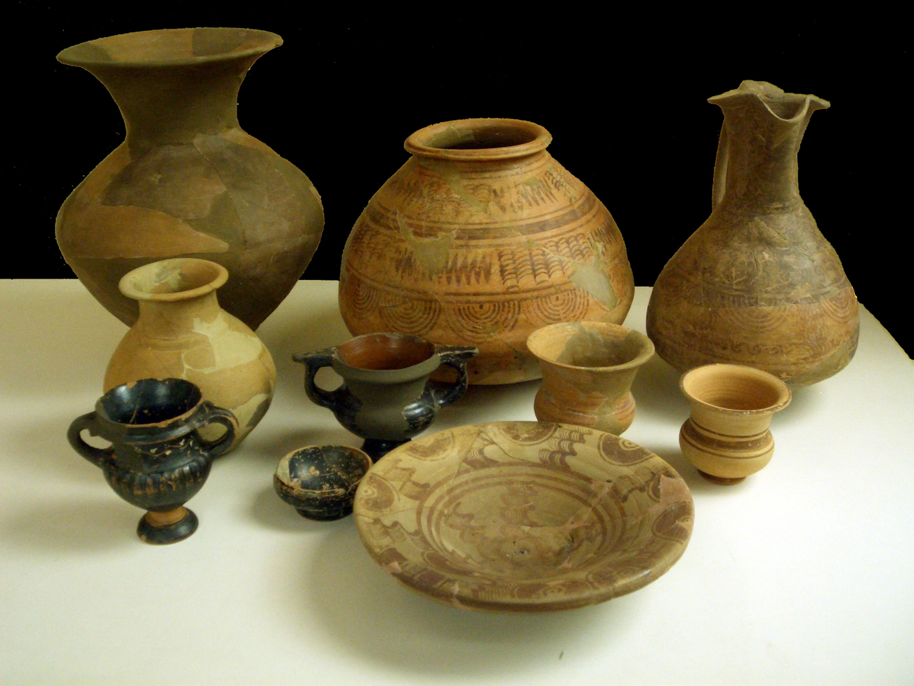 Cerámica ibérica pintada e importaciones griegas del Castellet de Bernabé